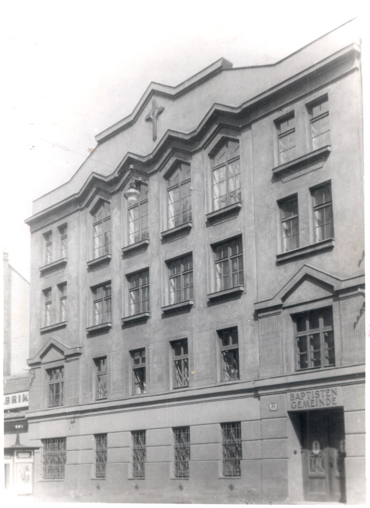 Vorderansicht des Gemeindehauses der Baptistengemeinde Wien-Mollardgasse